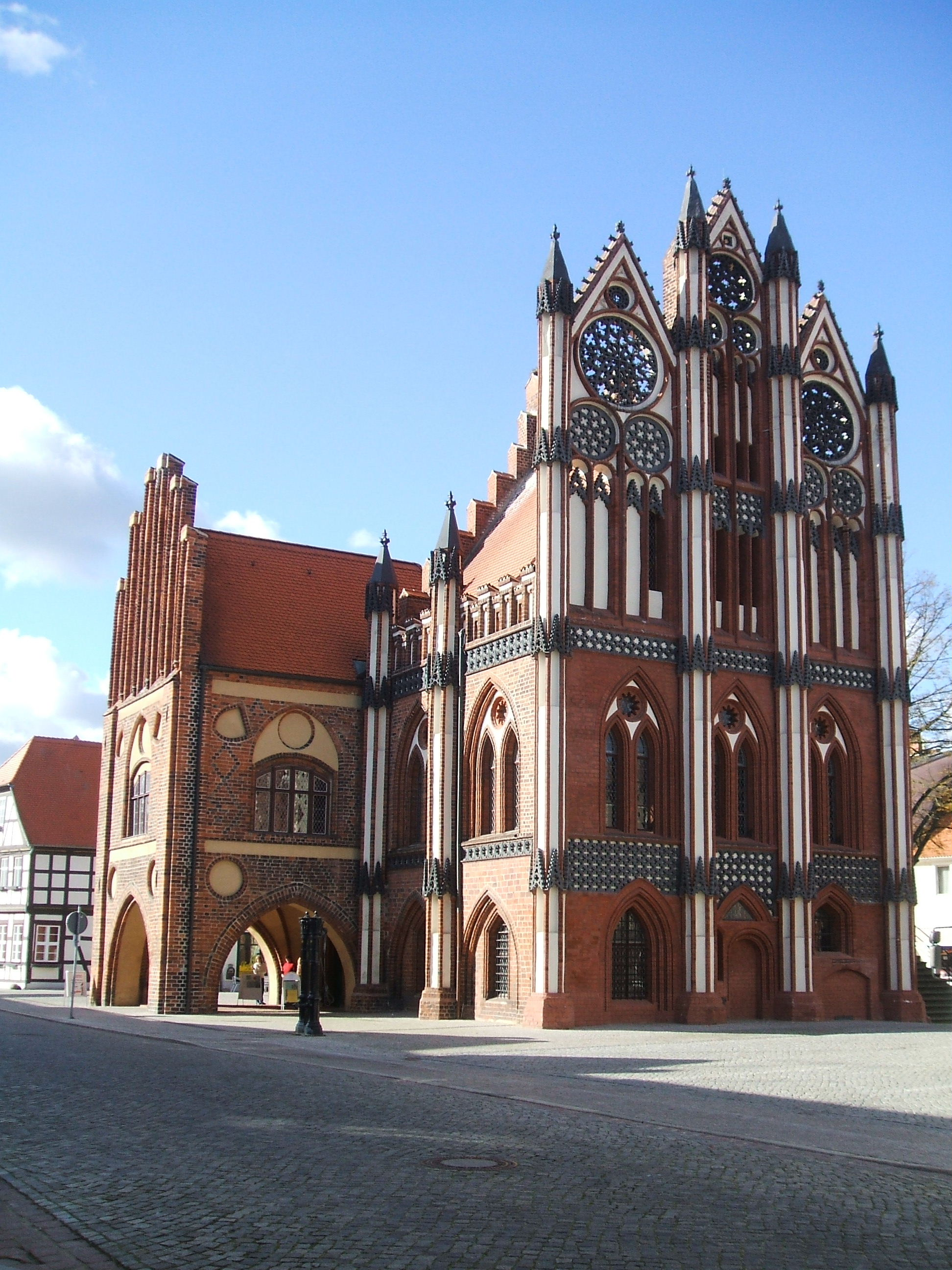 Tangermünde,_Historisches Rathaus